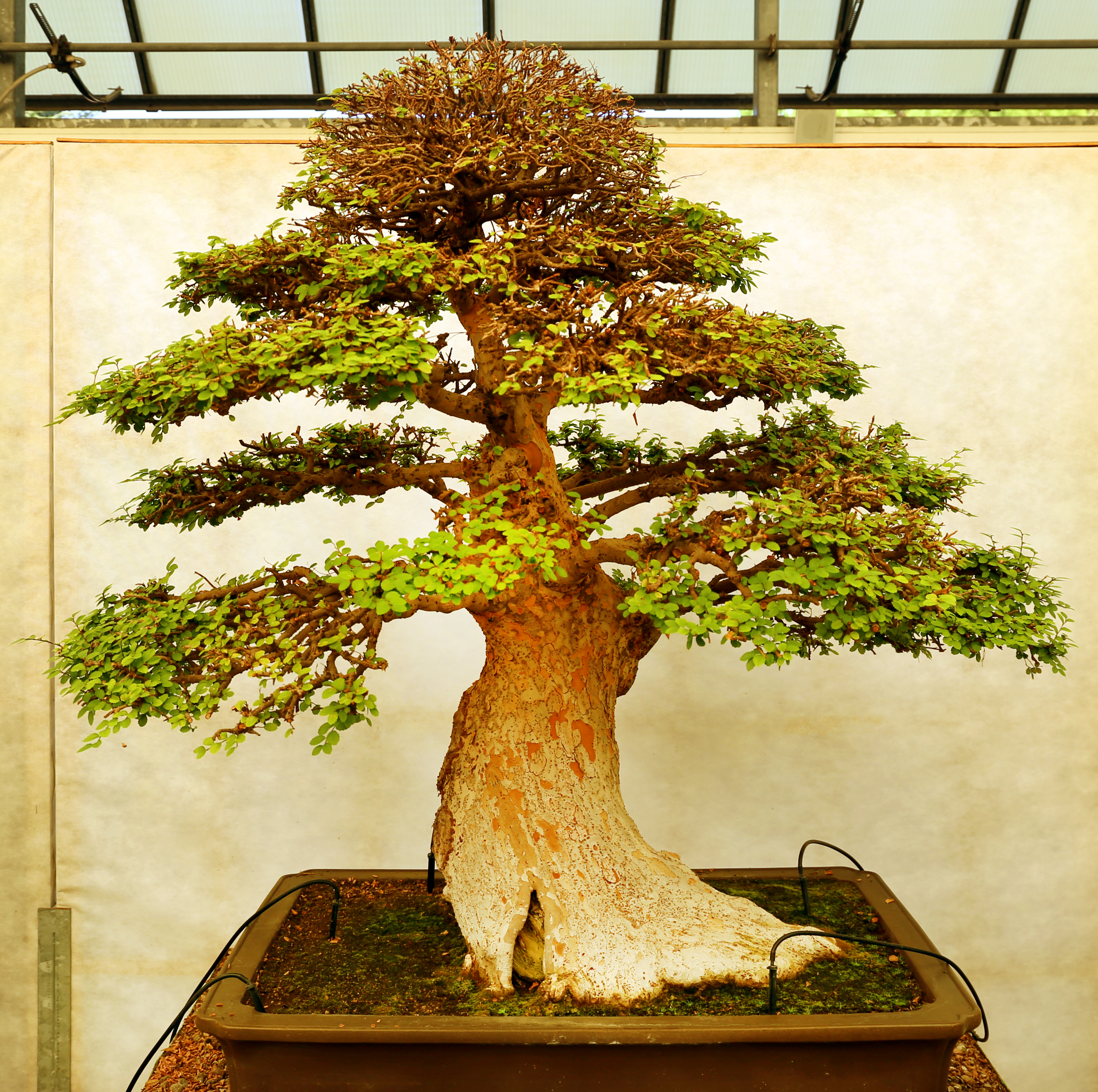 Museo del bonsai This is a photo of a monument which is part of cultural heritage of Italy.